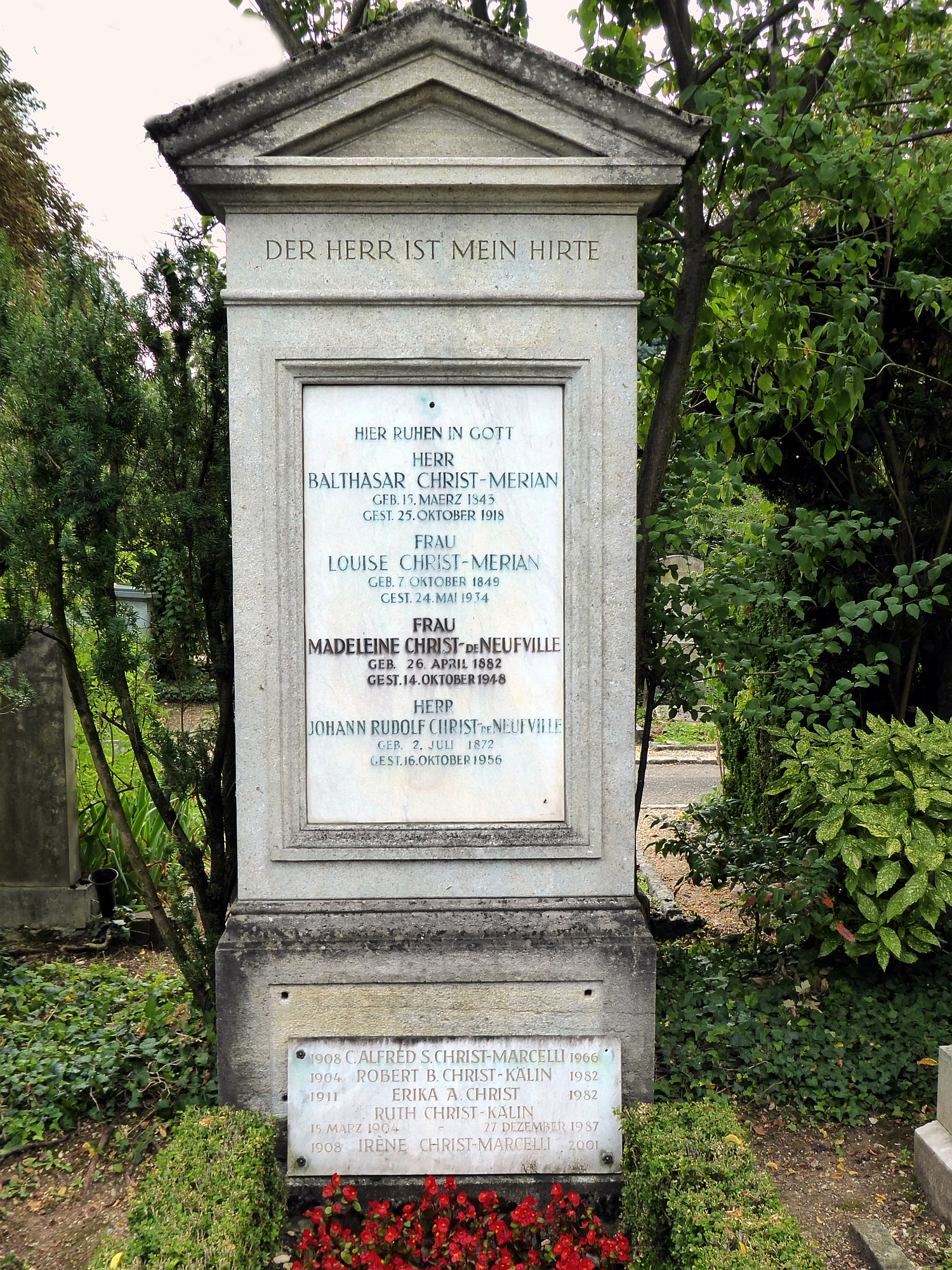 Robert Balthasar Christ-Kälin (1904–1982) Textilkaufmann, Journalist unter seinem Pseudonym «Fridolin Glopfgaischt» (Klopfgeist), bekannt. Grab auf dem Friedhof Wolfgottesacker, Basel